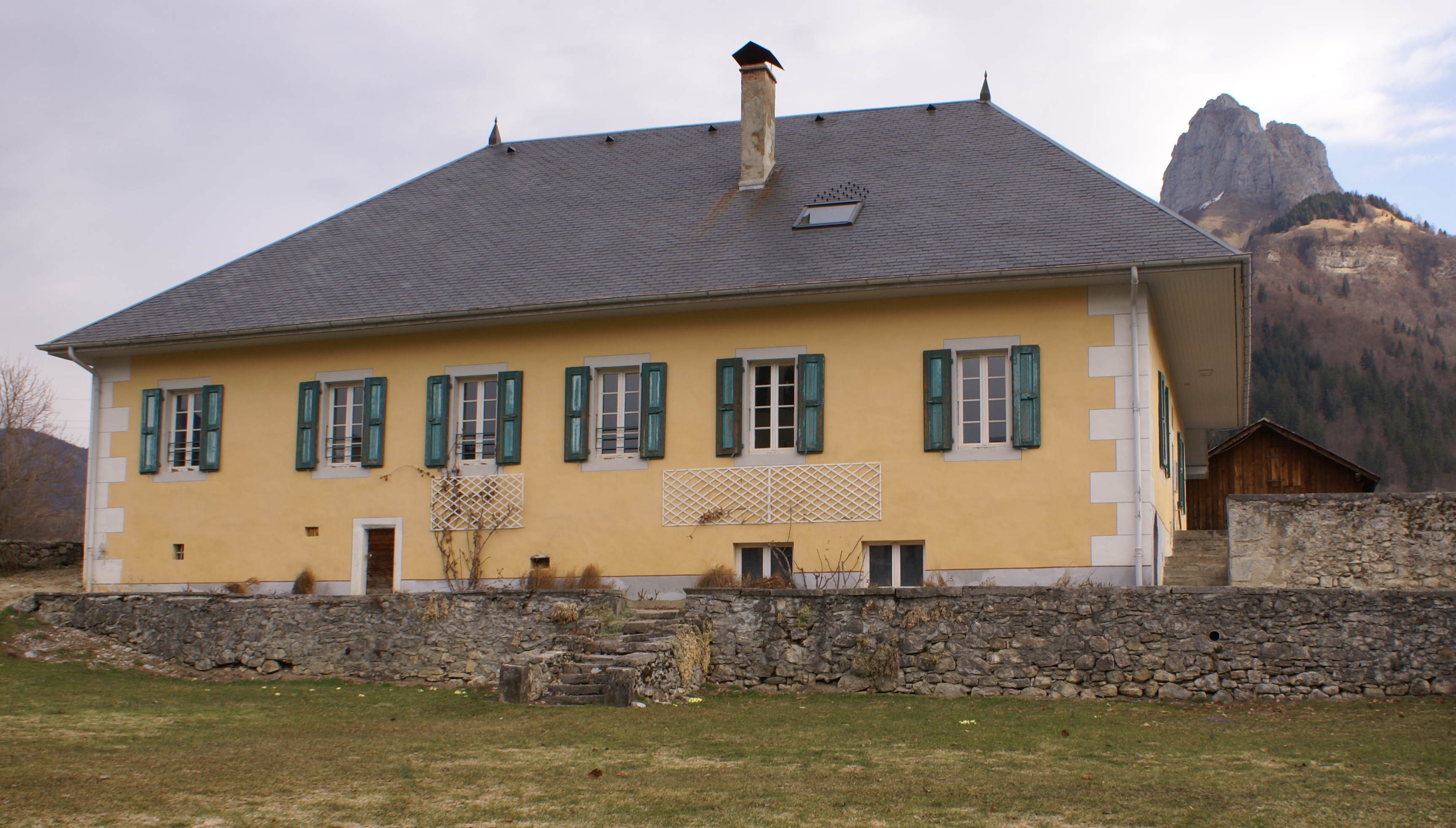 Mairie de Jarsy aménagée dans le bâtiment de l'ancien presbytère. En arrière-plan, la dent de Pleuven.